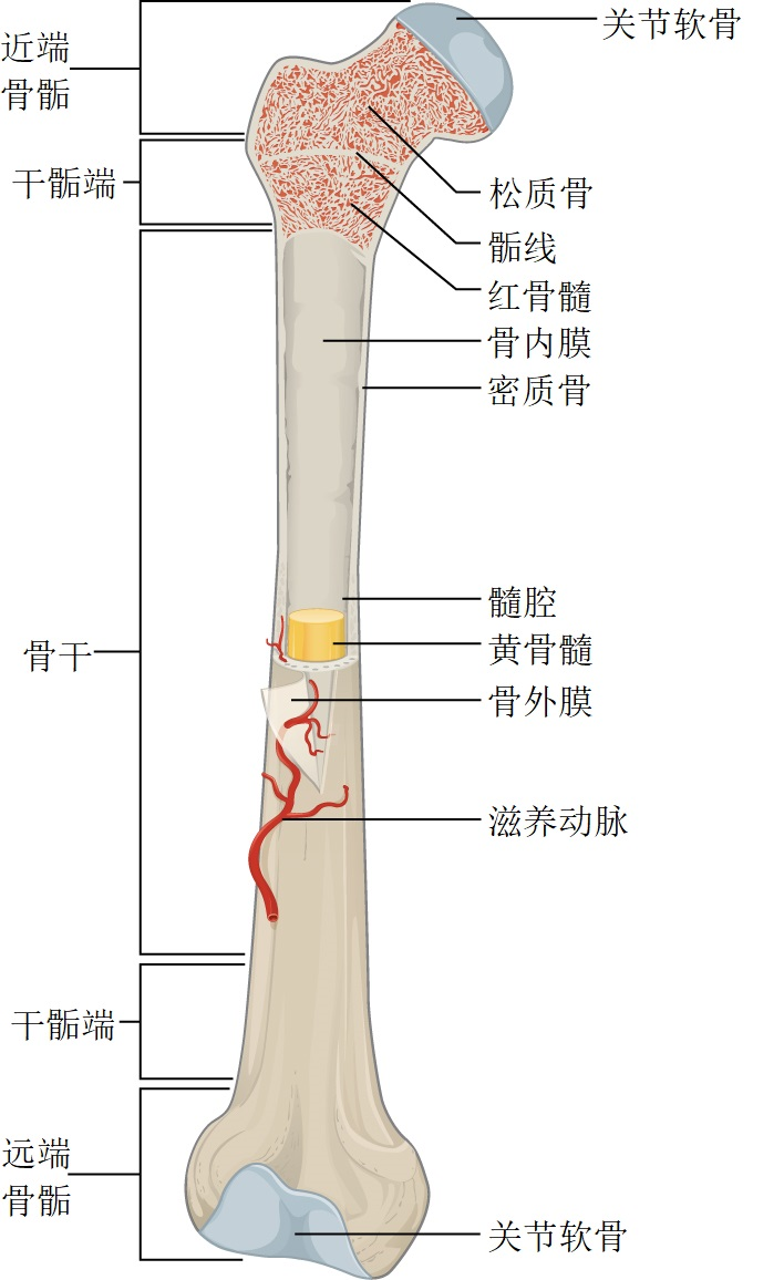 插图，来自Anatomy & Physiology，Connexions网站。